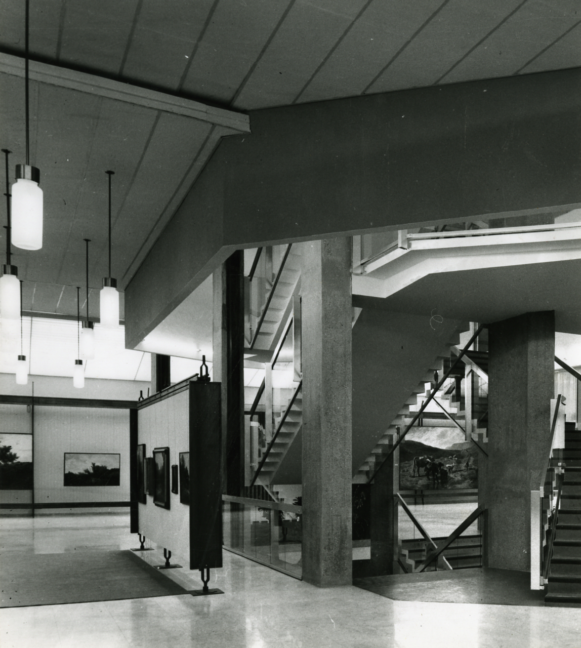 Servizio fotografico : Torino, 1959 / Paolo Monti. - Stampe: 3 : Positivo b/n, gelatina bromuro d'argento/ carta, 24x30. - ((Sul coperchio della scatola iscrizione didascalica manoscritta a pennarello nero: "Archit. Moderna". - Il nuovo edificio della Gam venne inaugurato nel 1959. - Occasione: Documentazione per le pubblicazioni: "Zodiac", Milano, Edizioni di Comunità, 1960 ca. - Occasione: Santini Pier Carlo, "La galleria d'Arte Moderna di Torino", pagg.66-79, in "Comunità", Milano, anno XIV, n°76, gennaio 1960. - Fonte: Rubrica di Paolo Monti: Archivio 10x12 (ultimi numerati) - dal G1 al (s.d.), presso Archivio Paolo Monti. - Fonte: Periodico: Zodiac, Milano, Edizioni di Comunità (1960). - Fonte: Periodico di Santini, Pier Carlo: La galleria d'Arte Moderna di Torino, pagg.66-79, in Comunità, Milano, anno XIV, n°76, gennaio 1960 (1960/01). Foto di Paolo Monti e altri